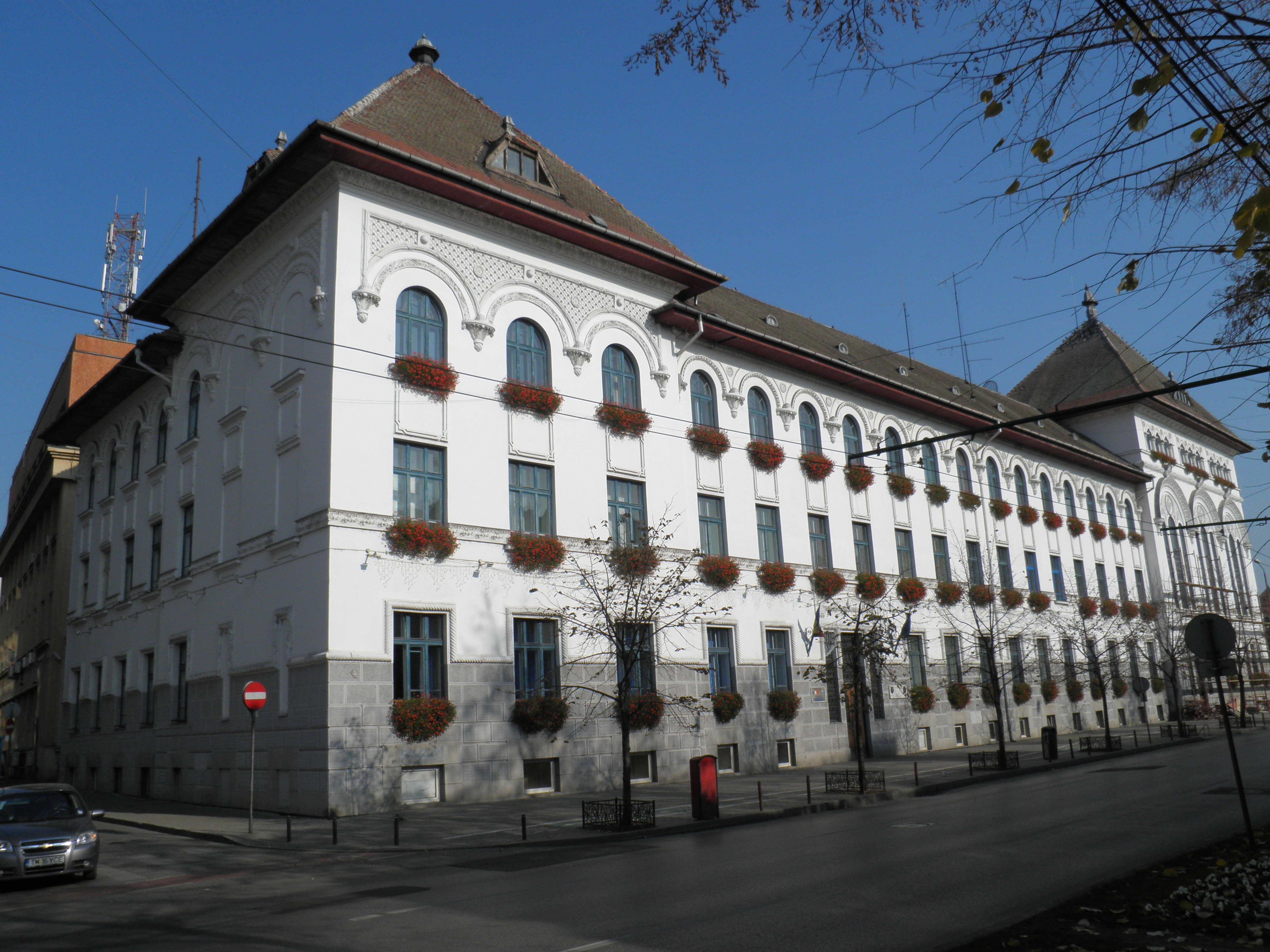 Primăria Municipiului Timişoara